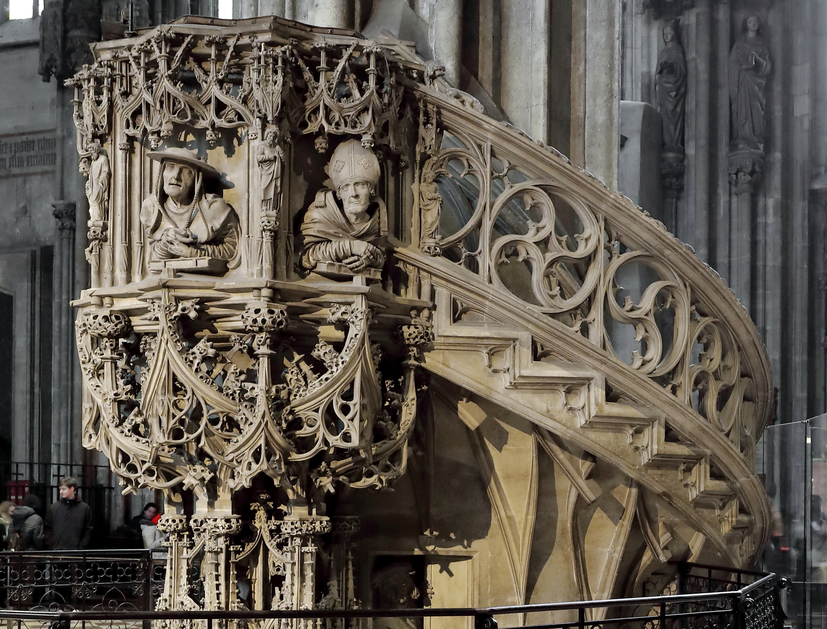 Die Domkanzel des Stephansdoms in der österreichischen Bundeshauptstadt Wien.Die aus 3 Sandsteinblöcken bestehende Domkanzel wird Anton Pilgram zugeschrieben und wurde um 1510 vollendet. Am Kanzelkorb sind die 4 Heiligen und Kirchenväter Augustinus mit Mitra, Gregor der Große mit Papstkrone, Hieronymus mit Kardinalshut und Ambrosius mit Mitra dargestellt (v.l.n.r.).